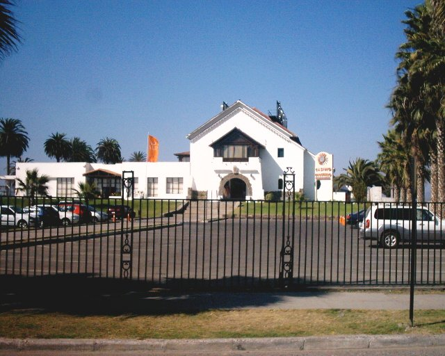 Casino de Juegos de Coquimbo. Enero de 2006.